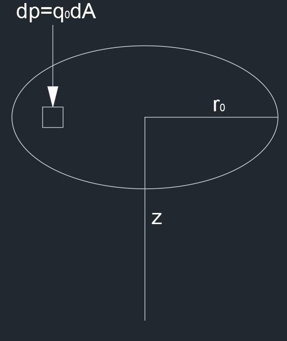 원형 등분포 하중 응력